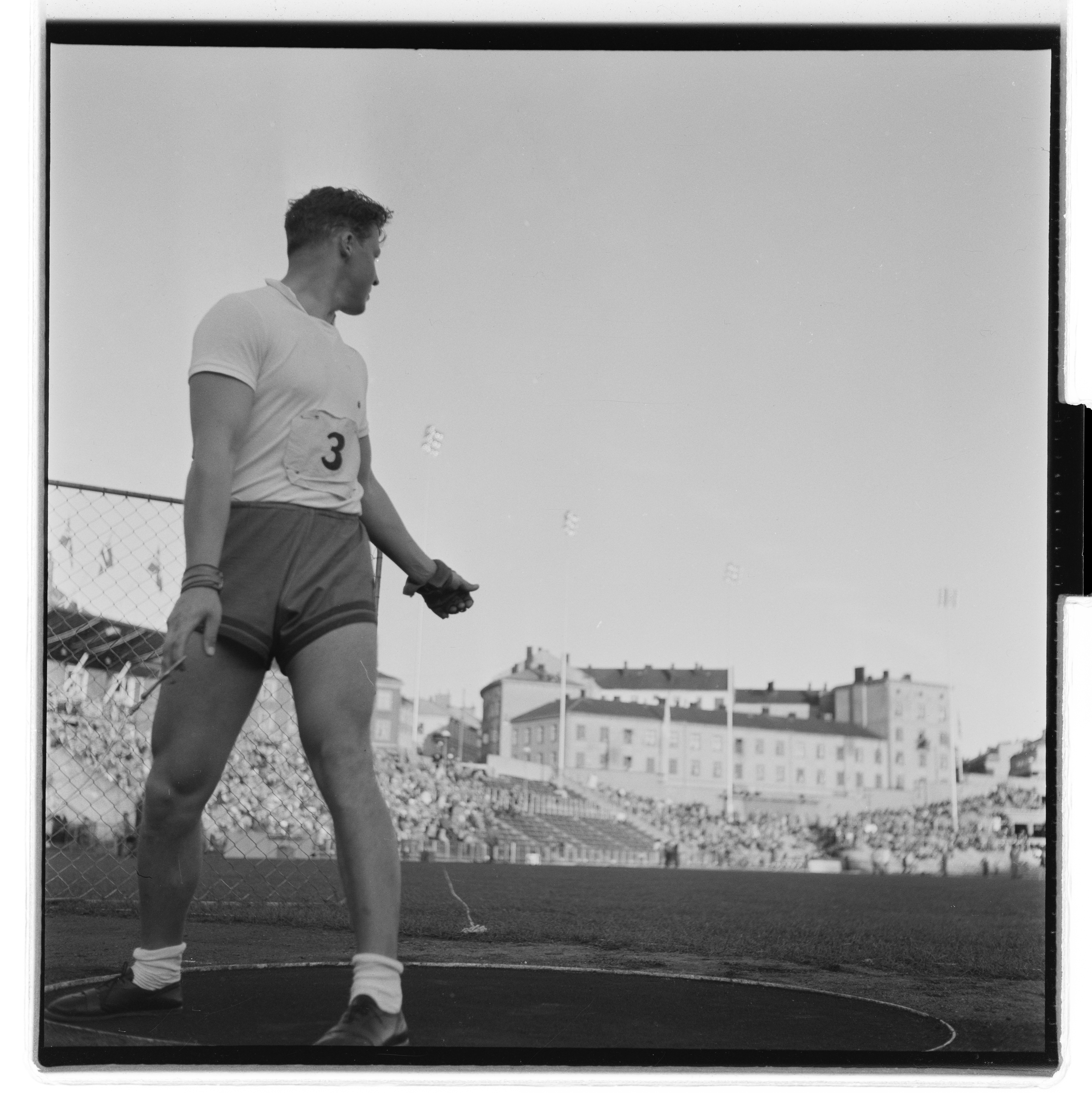 Bildet er hentet fra Arkivverket. Friidrett, Bislet (Oslo-lekene). NÅ nr. 20, 1953. A: Sverre Strandli, slegge; Imre Nemeth, slegge; Joseph Czermak, slegge; Egil Danielsen, spyd; Gordon Pirie, langdistanse; Audun Boysen, mellomdistanse (med Nielsen); Gunnar Nielsen, dansk mellomdistanseløper.B: Tabori; Ikaros; Boysen; Strandli; Danielsen Arkivinstitusjon : Riksarkivet Arkivnavn : Billedbladet NÅ Sted : Norge, Oslo, Oslo, Bislet Avbildet